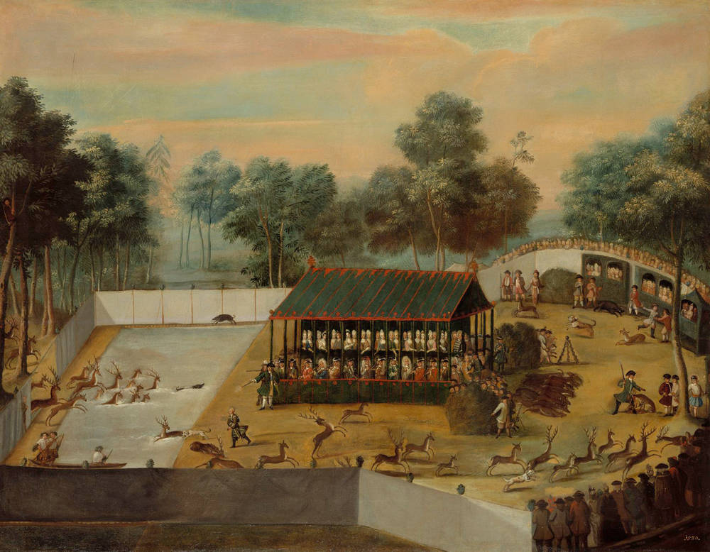 Eingestellte Jagd im Jahre 1718 bei Moritzburg, unbekannter Maler, Öl auf Leinwand, 112 x 145 cm, Gemäldegalerie Alte Meister in Dresden, Inv.-Nr. 99/165